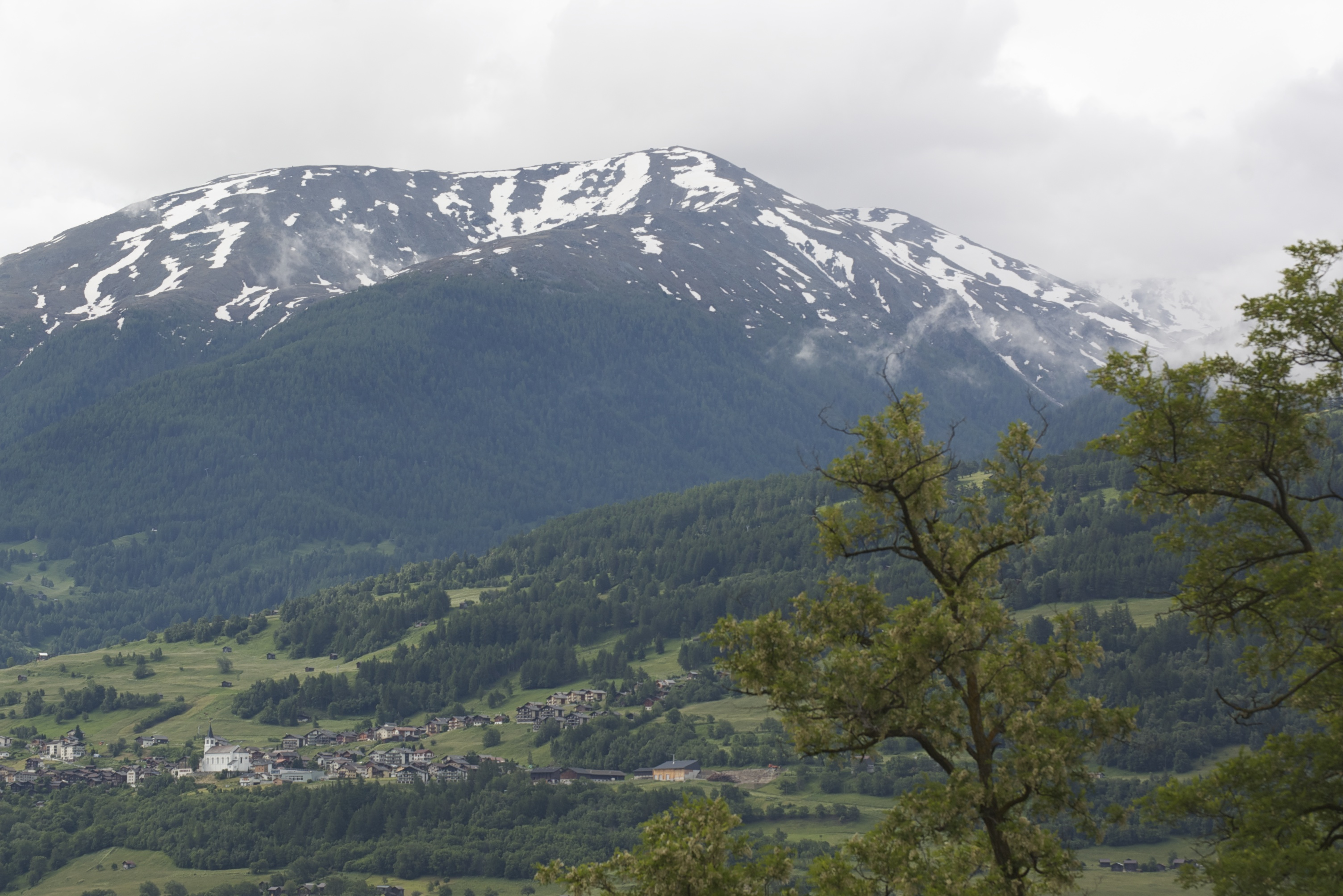 Blick von der Station Hohtenn ob Gieſch über Eyſcholl hinweg auf den Hühnergrat ob Underbäch.